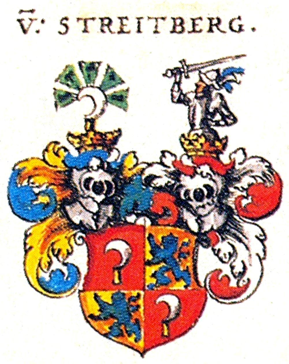 Ritterschaft und Adel in Franken von Streitberg